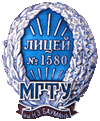 Знак об окончании лицея №1580